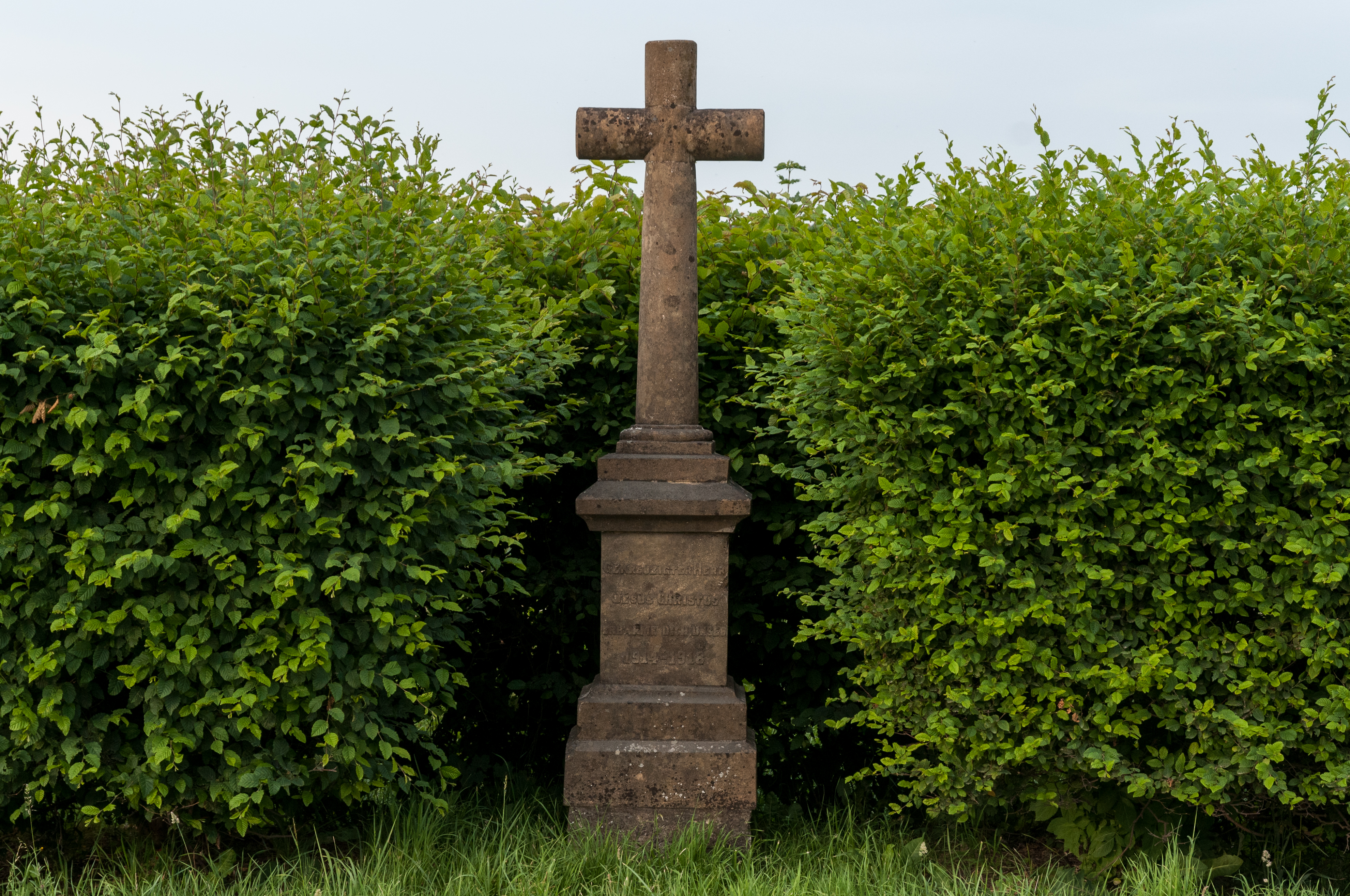 Weekräiz «Gekreuzigter Herr Jesus Christus erbarme Dich unser 1914-1918» am Ausgang vu Rëmerschen, lénks un der Wäistrooss a Richtung Schengen.